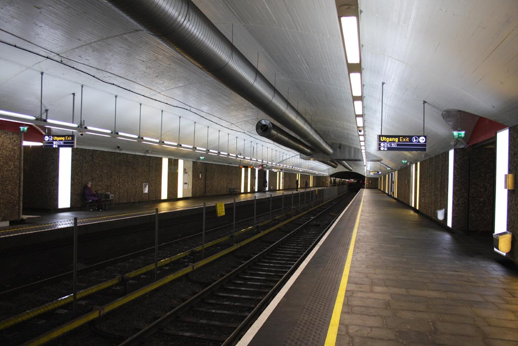 Nyoppusset Vestli T-banestasjon sett fra den delvis brukte plattform to. Oversiktsbilde over hele stasjonen.